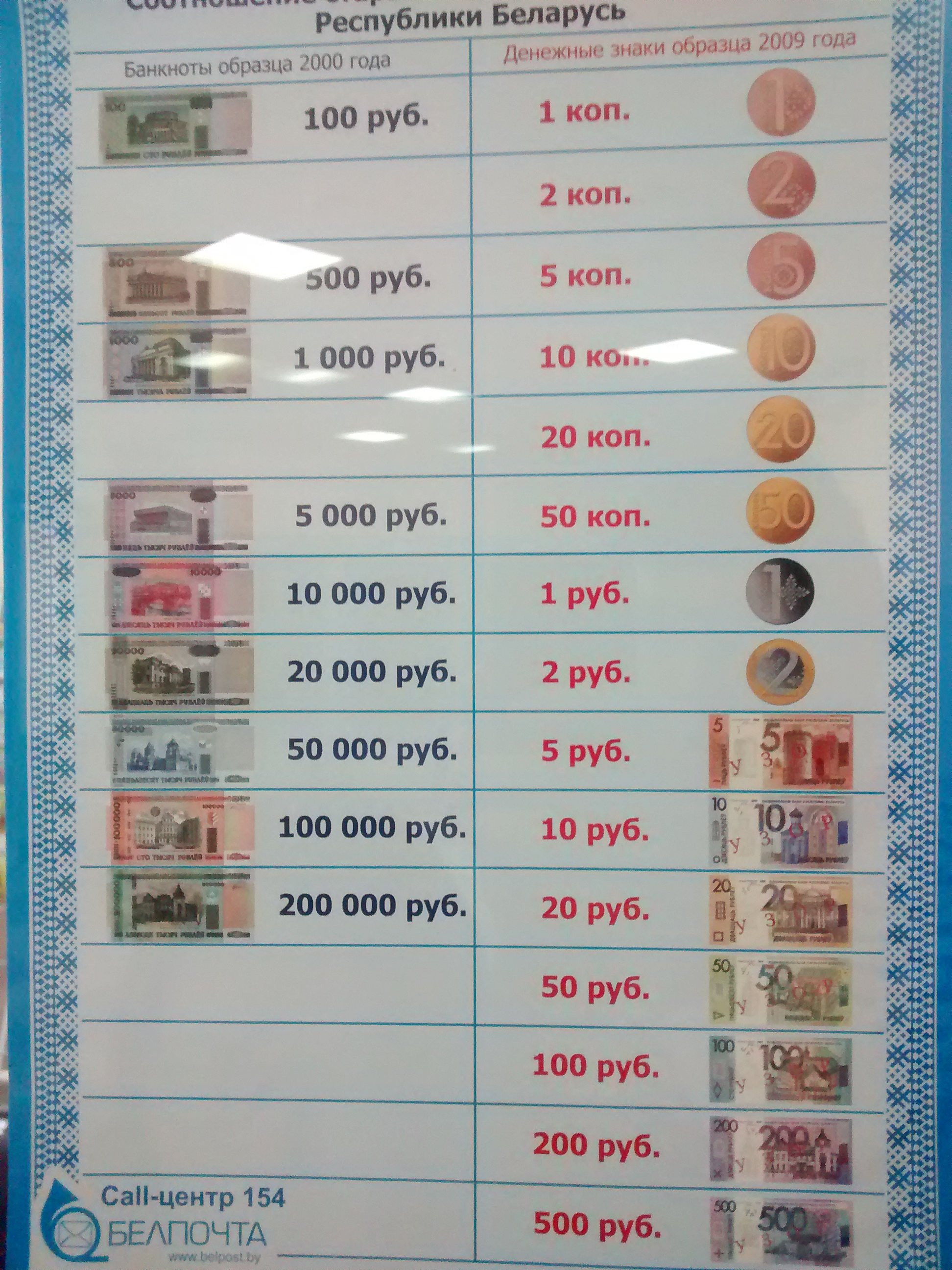 A gauche, les anciens roubles du Bélarus, à droite, en parallèle, les nouveaux en vigueur depuis le 1er juillet 2016. Les deux sont utilisés en 2016.